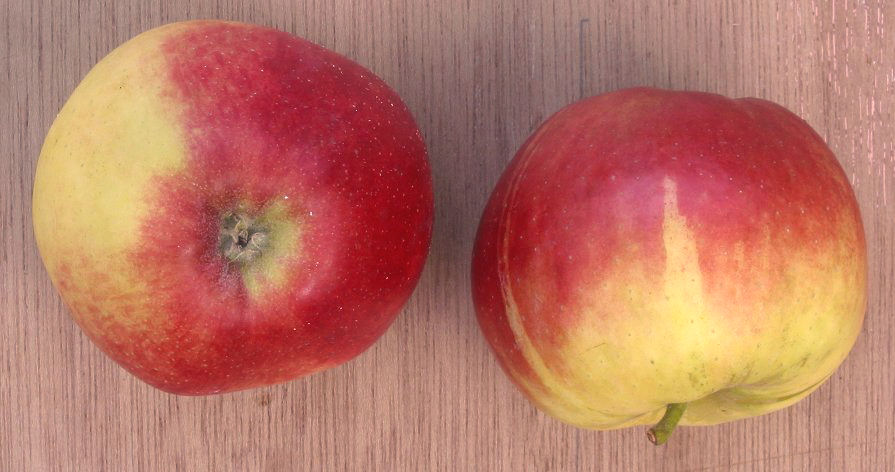 zelfgemaakte foto van het Nederlandse appelras Elstar; eind oktober